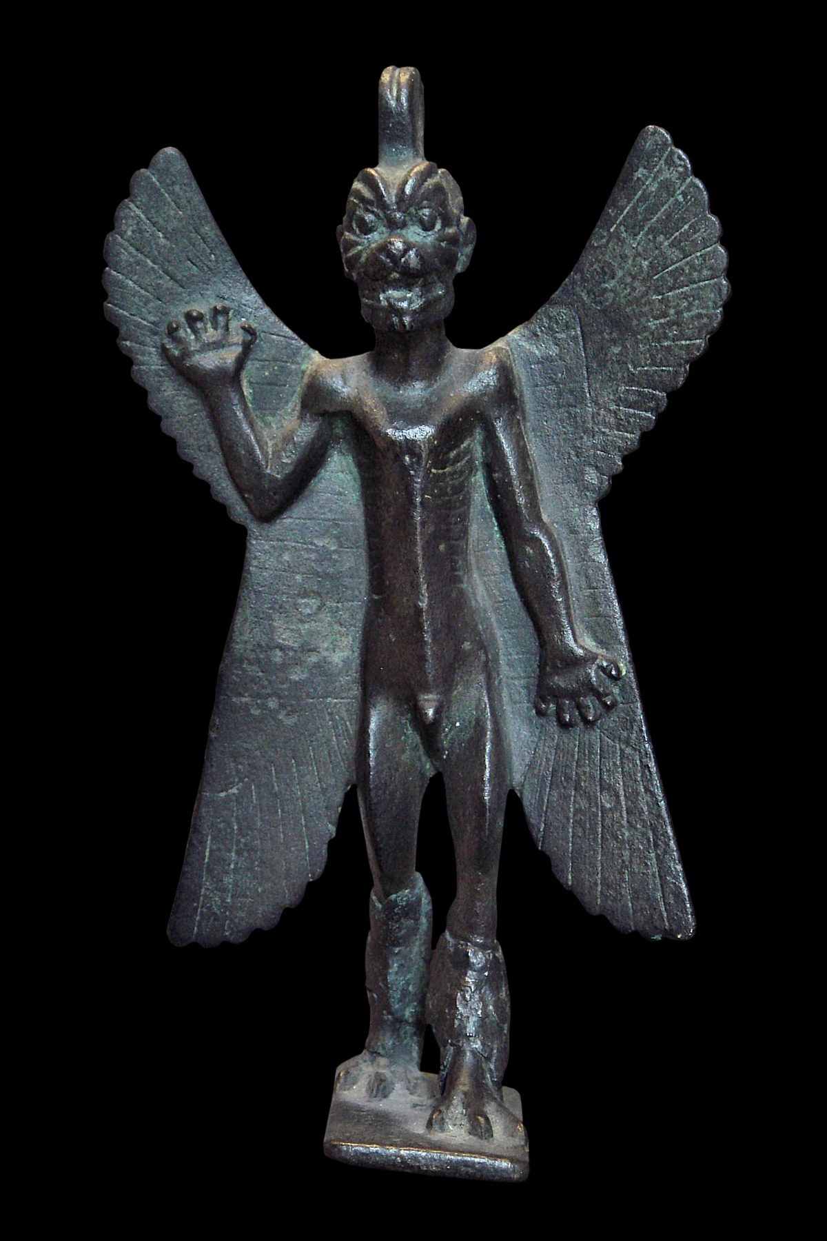 Pazuzu Bronze, first millenium BCE Assyrian demon Pazuzu, 1st millenium BCE.